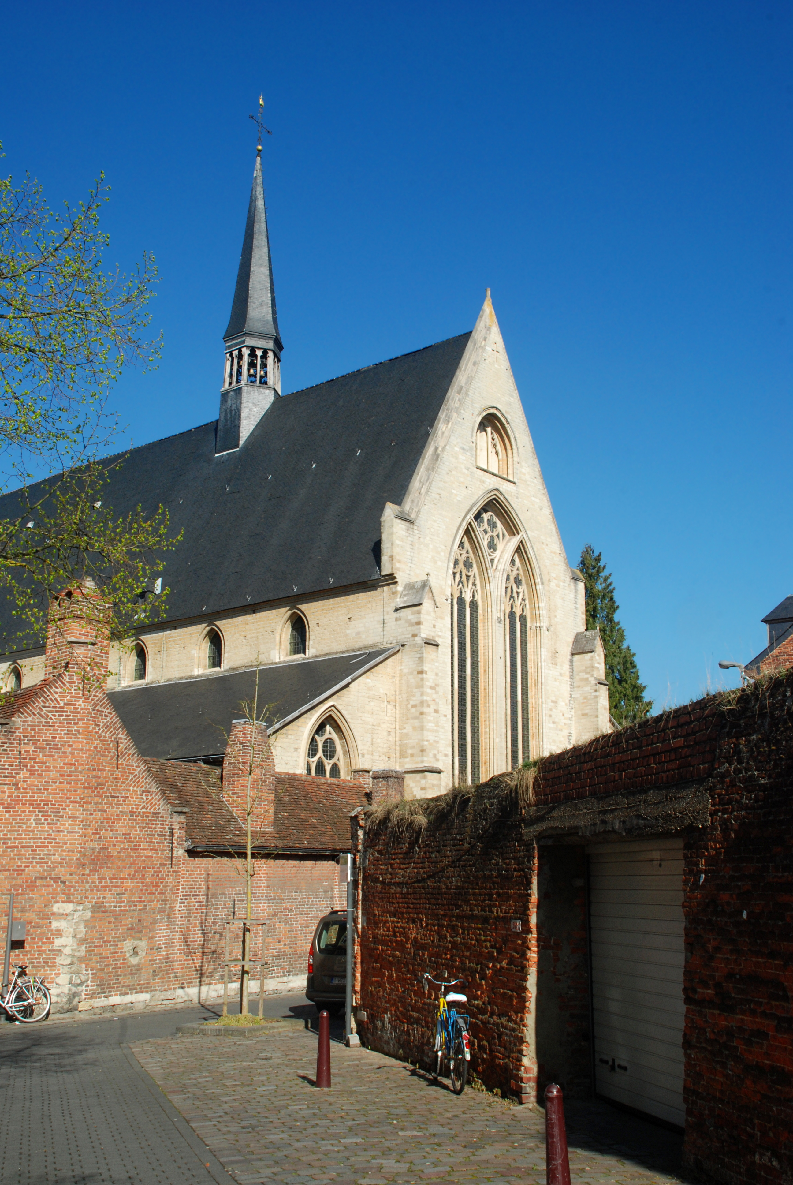 Belgique - Louvain - Église Saint-Jean-Baptiste-du-Béguinage